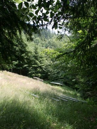 Kamień ołtarzowy na "Szymkowie" w Wiśle Bukowej